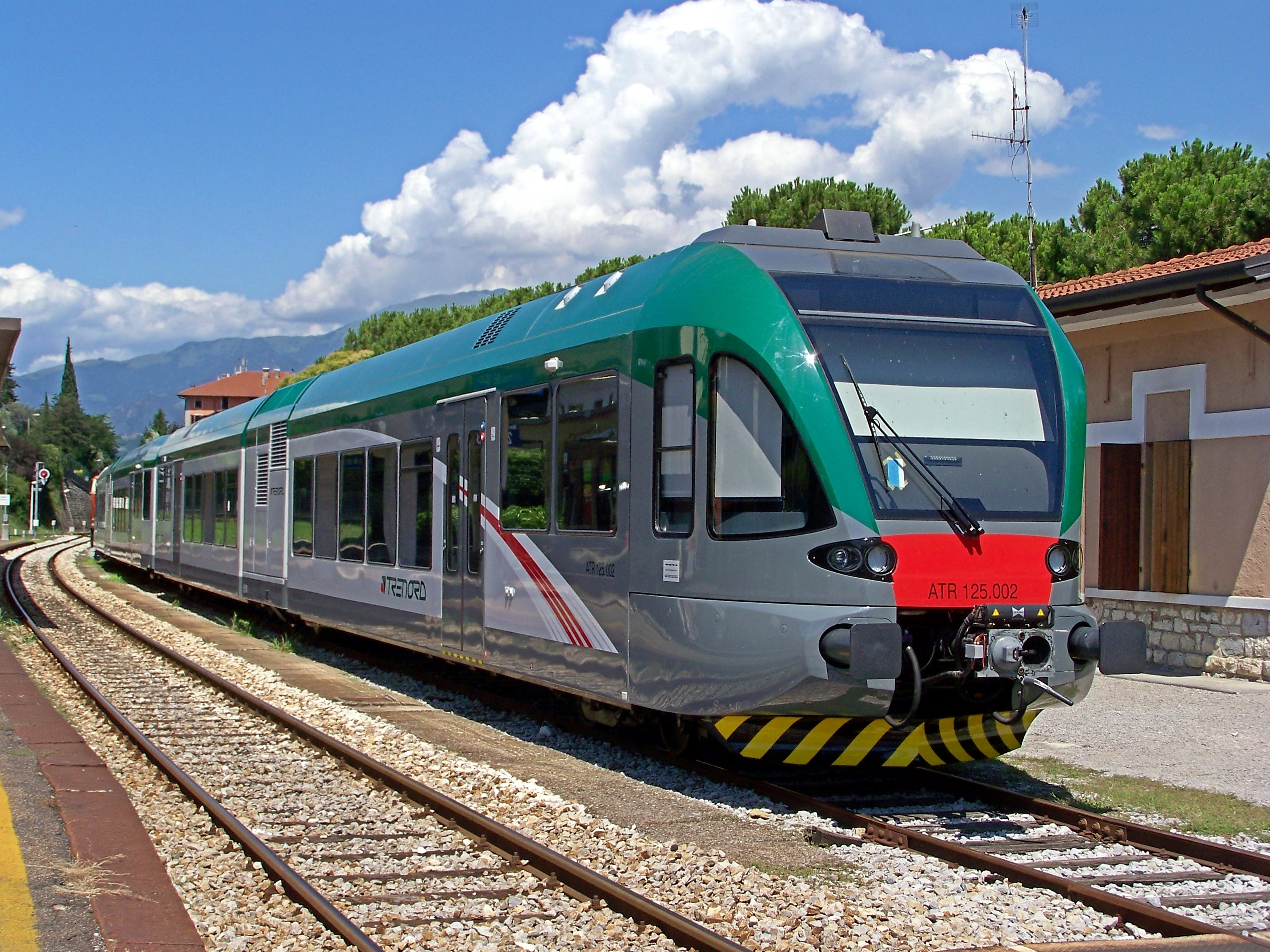 L'ATR 125.002 Trenord in sosta sul quarto binario della stazione di Iseo.